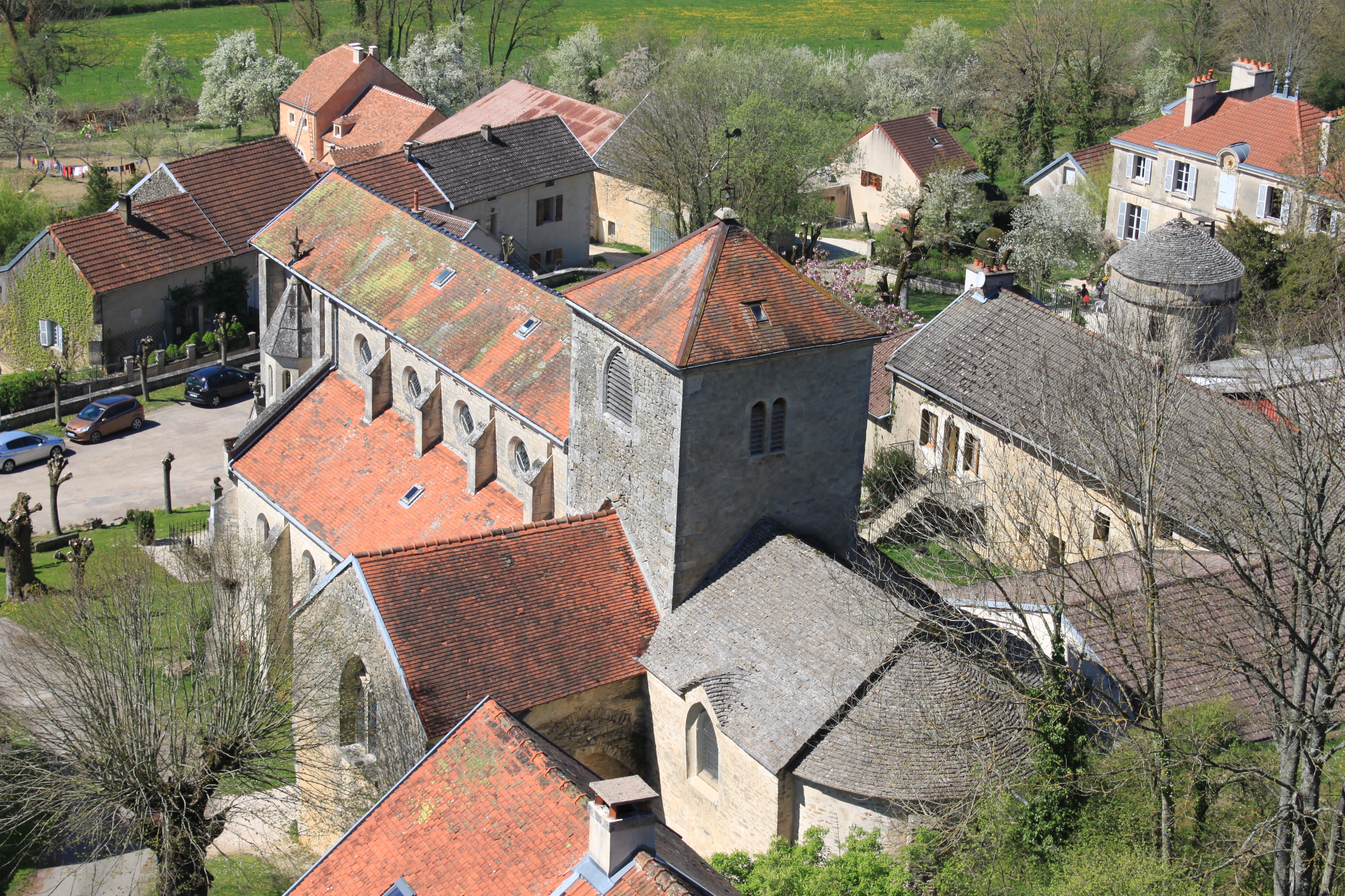 Salmaise, Cote-d'Or, Bourgogne, France